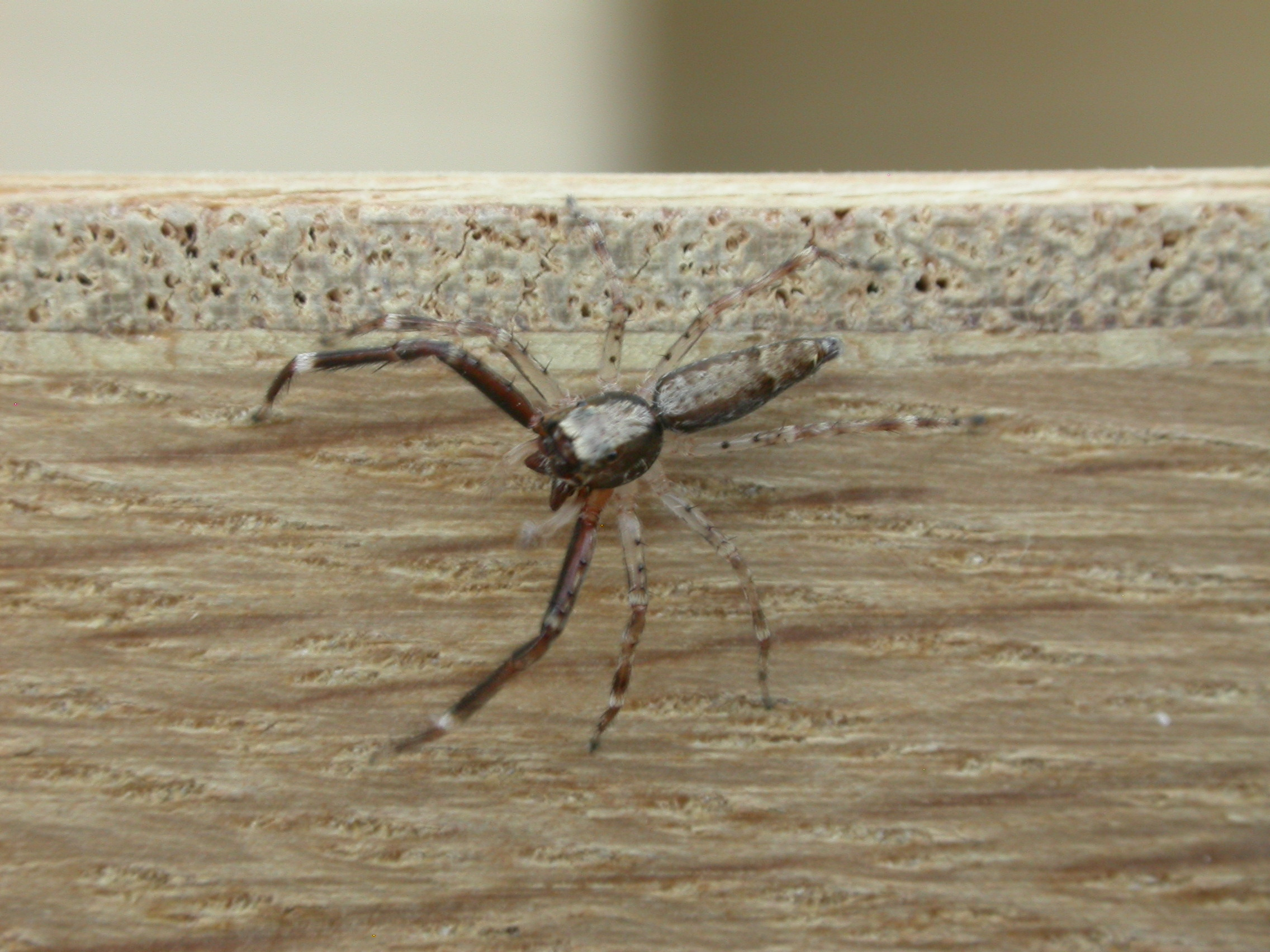 Helpis minitabunda (L. Koch, 1880), male, Aranda, ACT, 10 November 2008